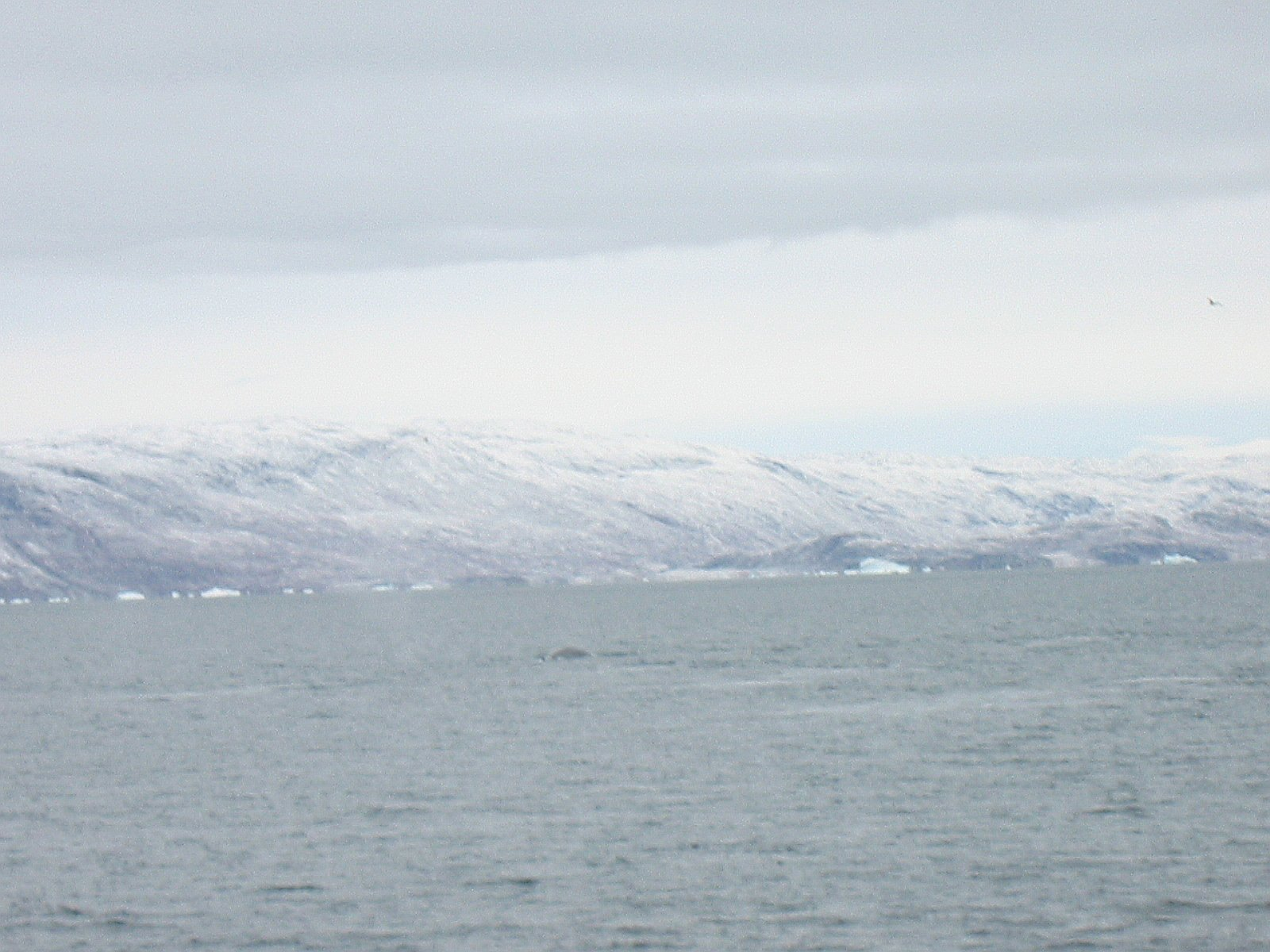 Distant Fin Whale, Disko Bay, Greenland